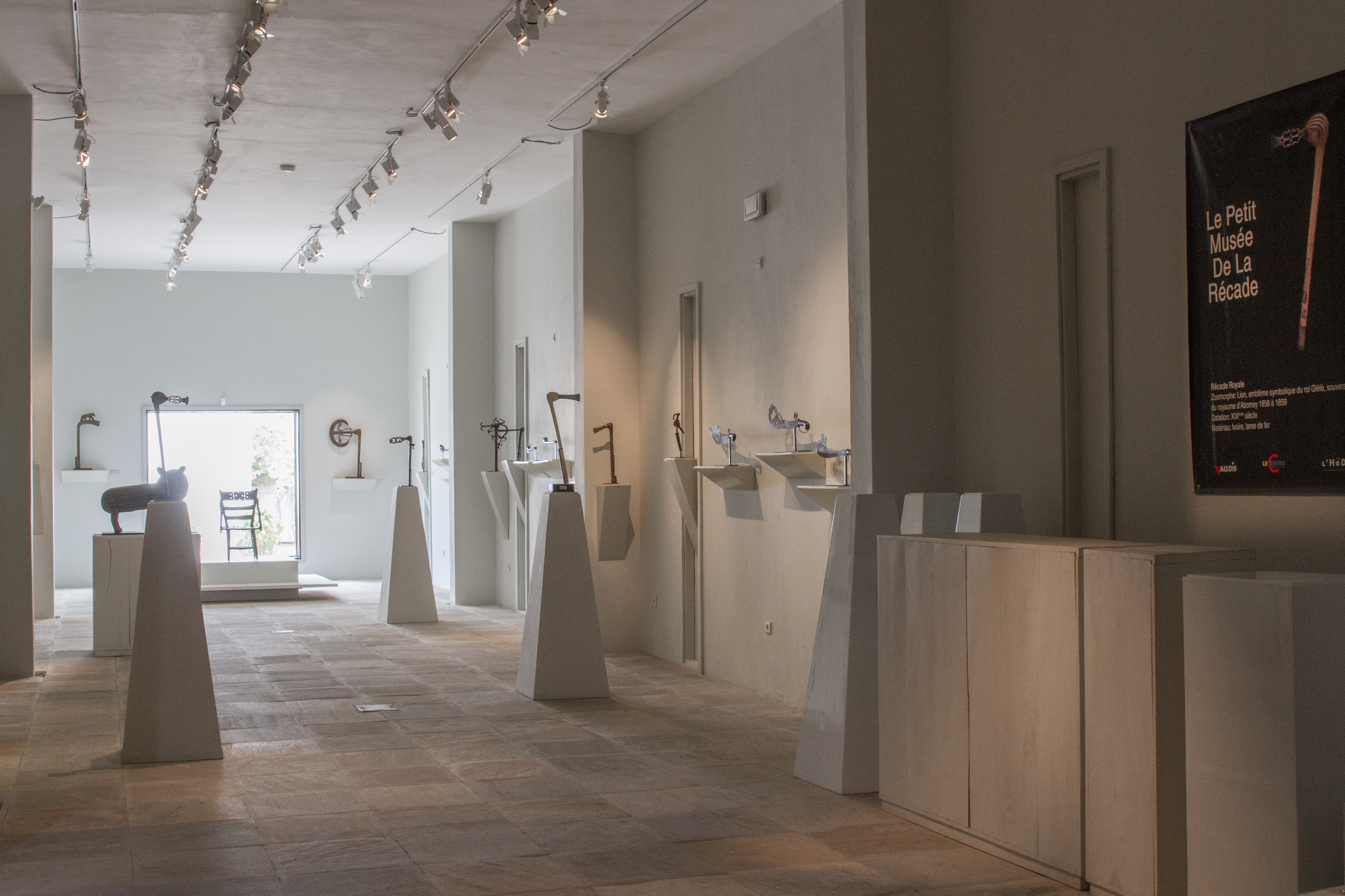 Vue du Petit Musée de la Récade. Premier musée au monde dédié à la récade, symbole du pouvoir royal au Danxomè.